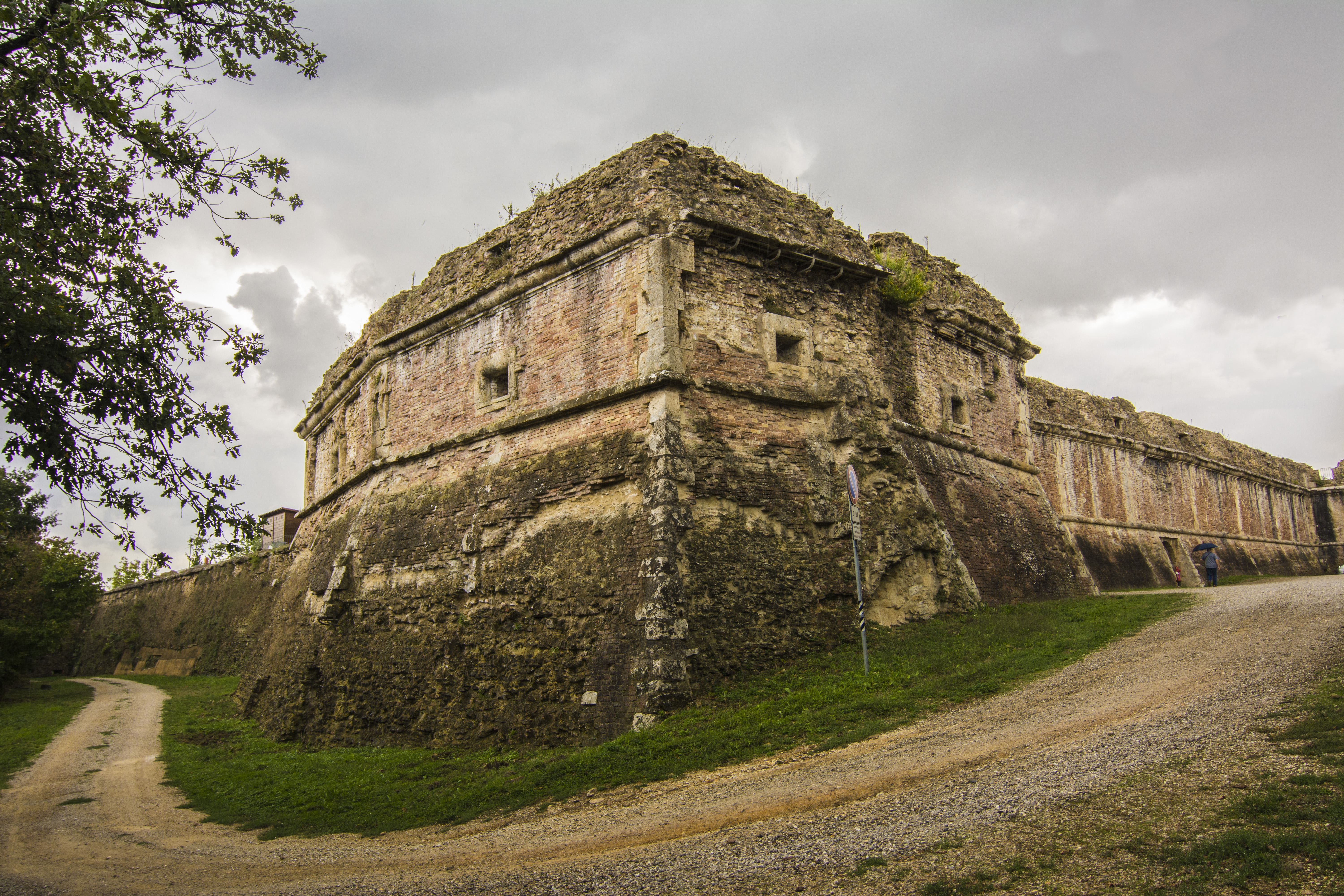 Fortezza di Poggio Imperiale This is a photo of a monument which is part of cultural heritage of Italy.